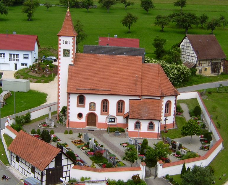 D 89584 Erbstetten: Dorfkirche St. Stefanus mit Friedhof